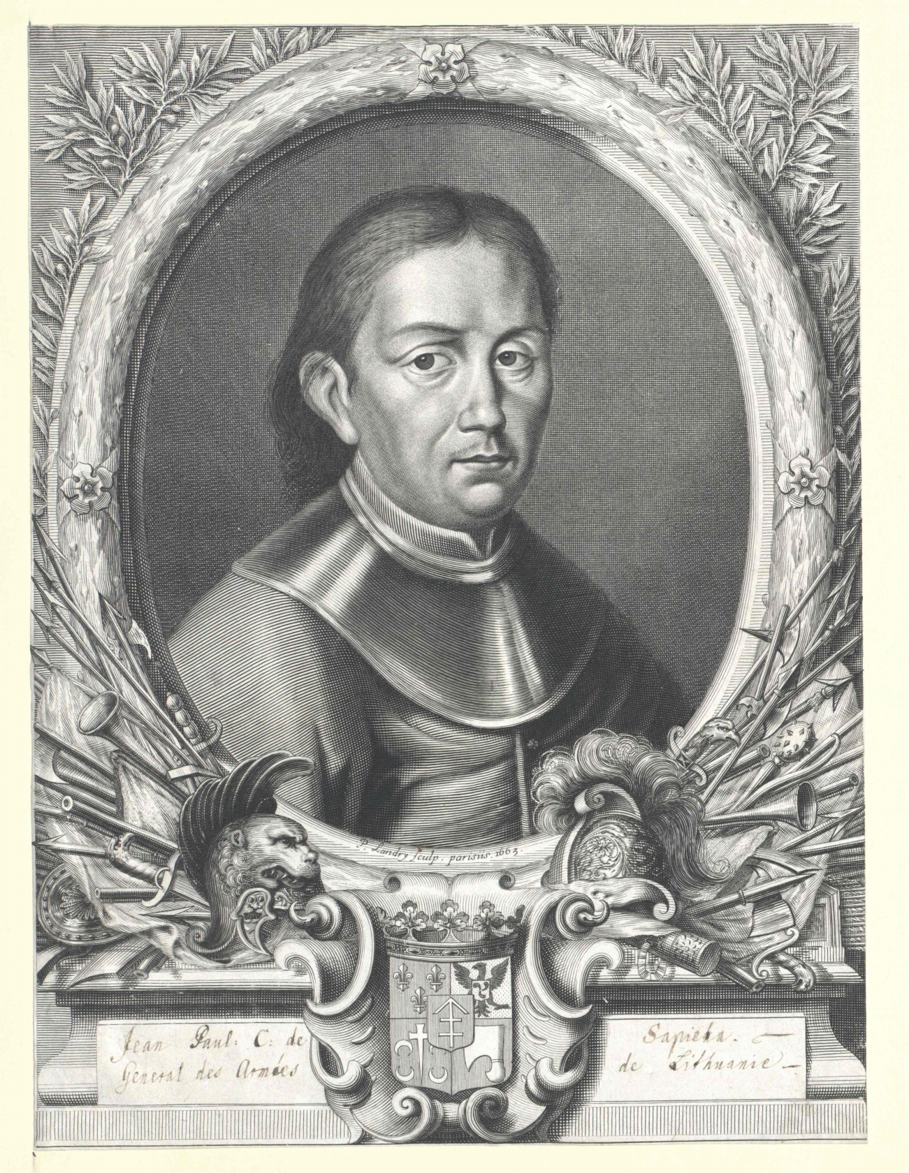 Беларуская (тарашкевіца): Партрэт Казімера Льва Сапегі (Kazimier Leŭ Sapieha)